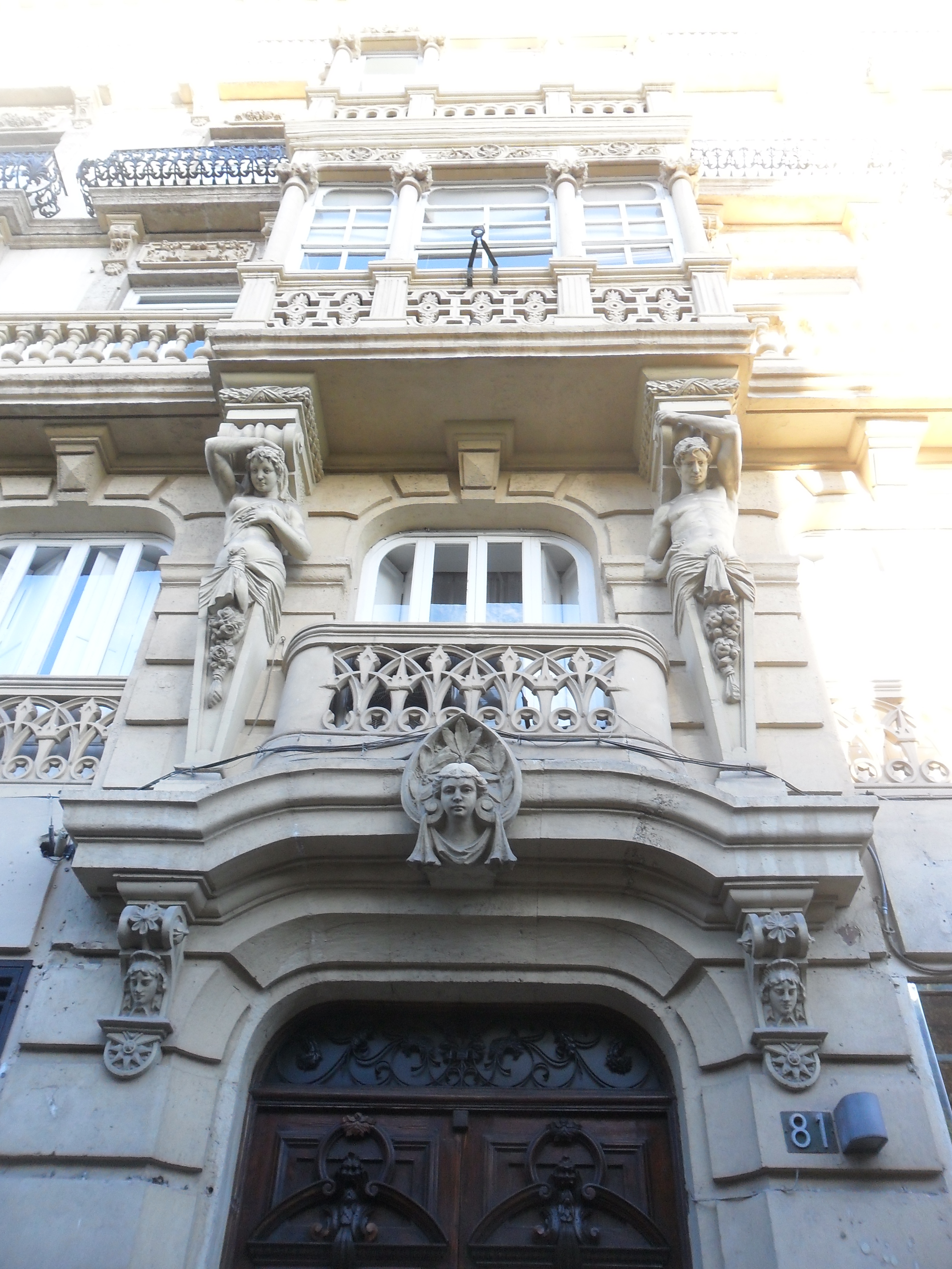 Fachada de la casa de los Telamones